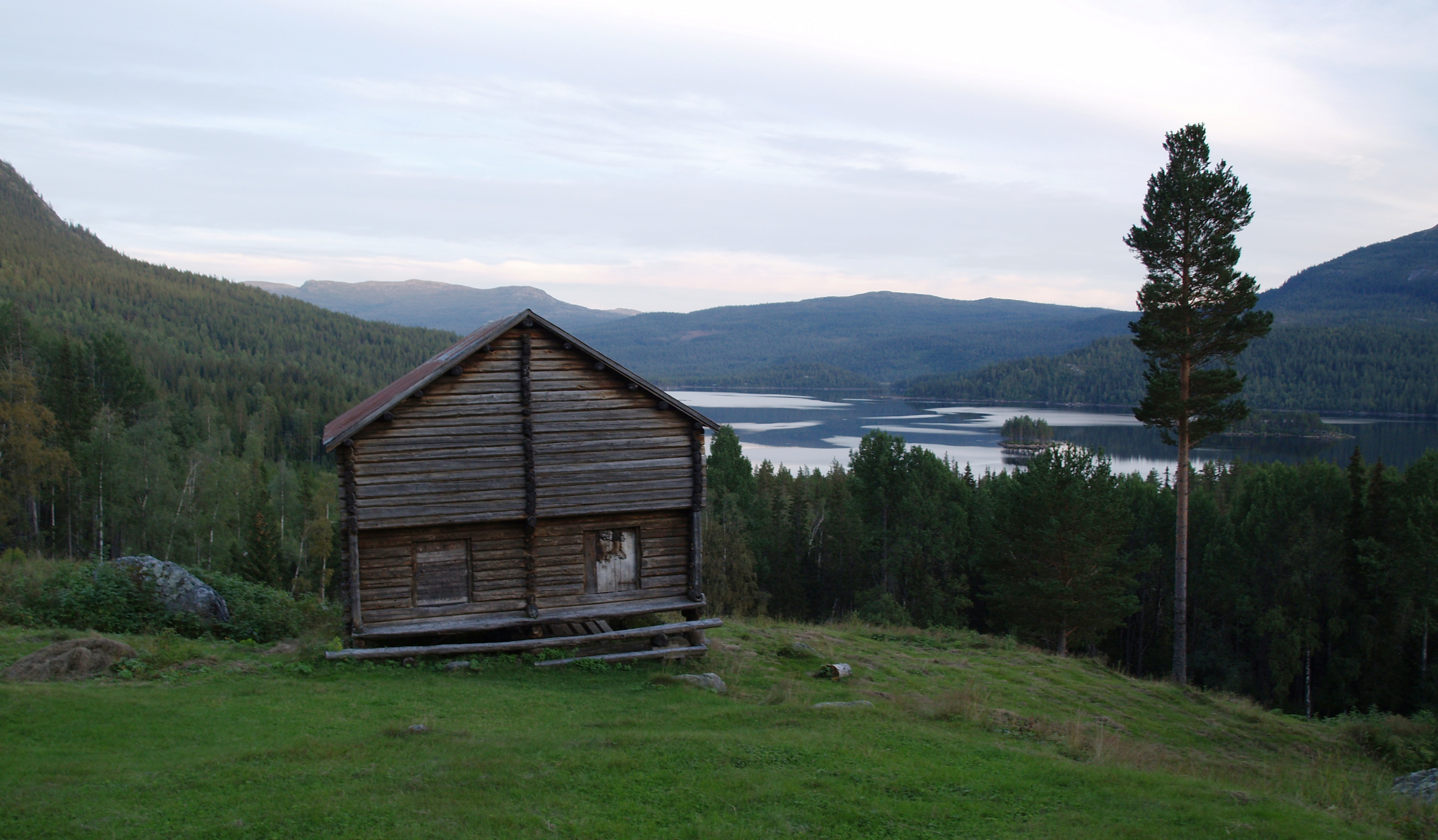 Vassfarplassen med stabburet og Nevlingen i bakgrunnen